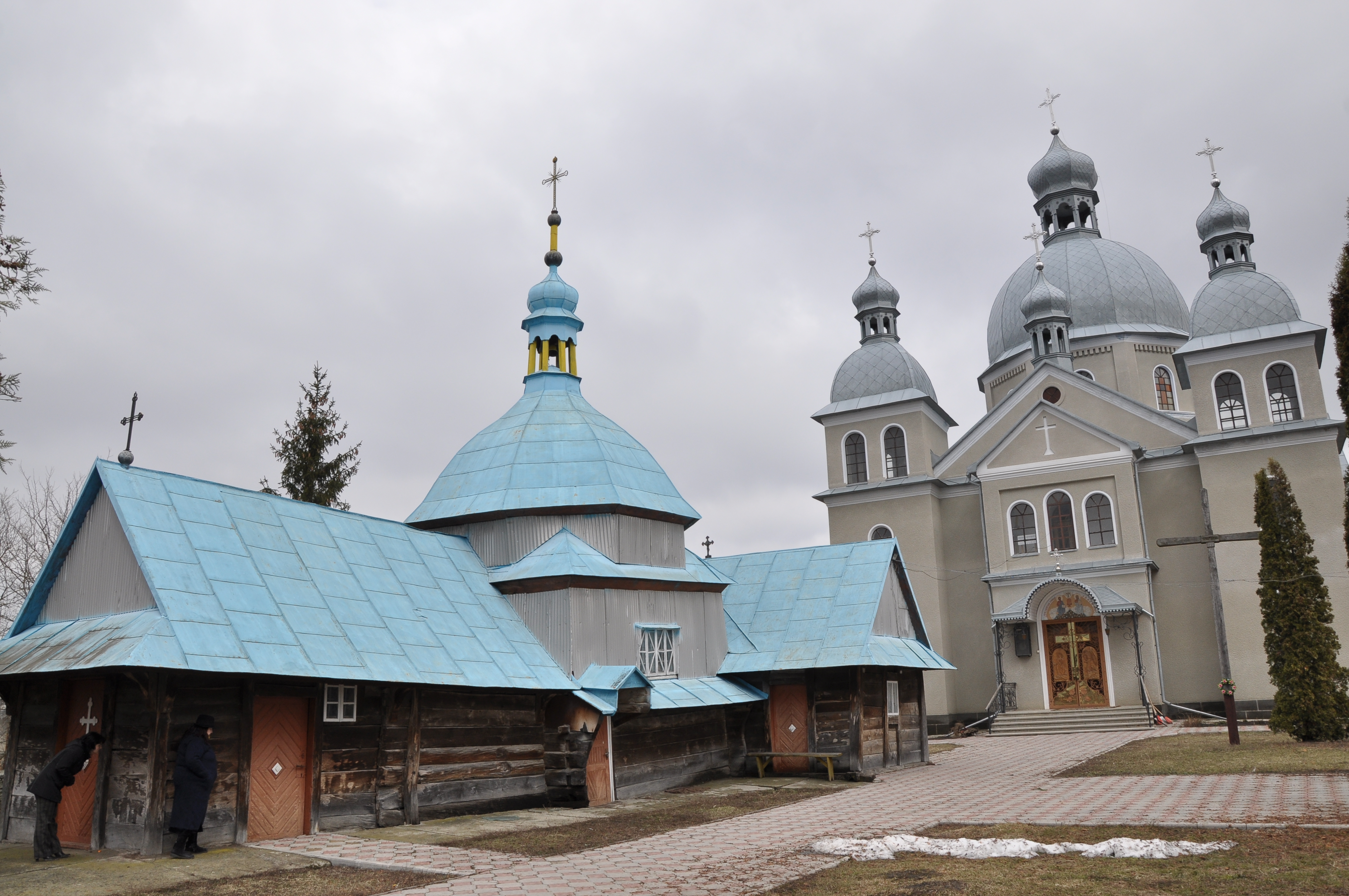 Церква Св. Трійці (дер.), село Заболотівка